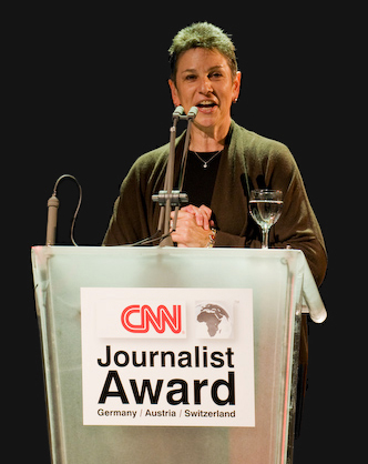 Susan Grant, Executive Vice President of CNN speaking at CNN Journalist Award 2008